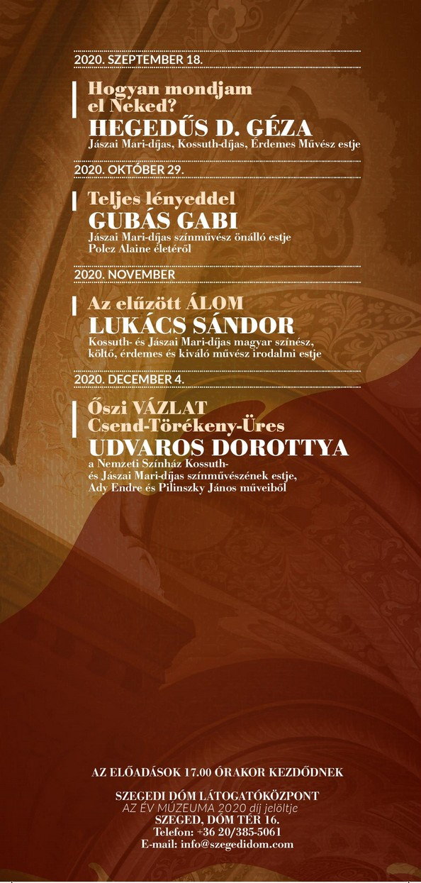 Dóm Művészeti Szalon őszi bérlet